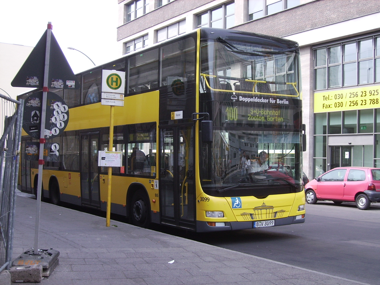 A Berlin double decker bus, line 100